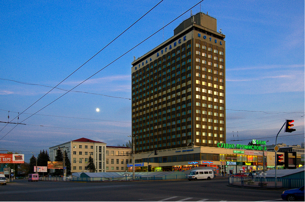 Луганск.Гостиница "Луганск".12 октября 2008